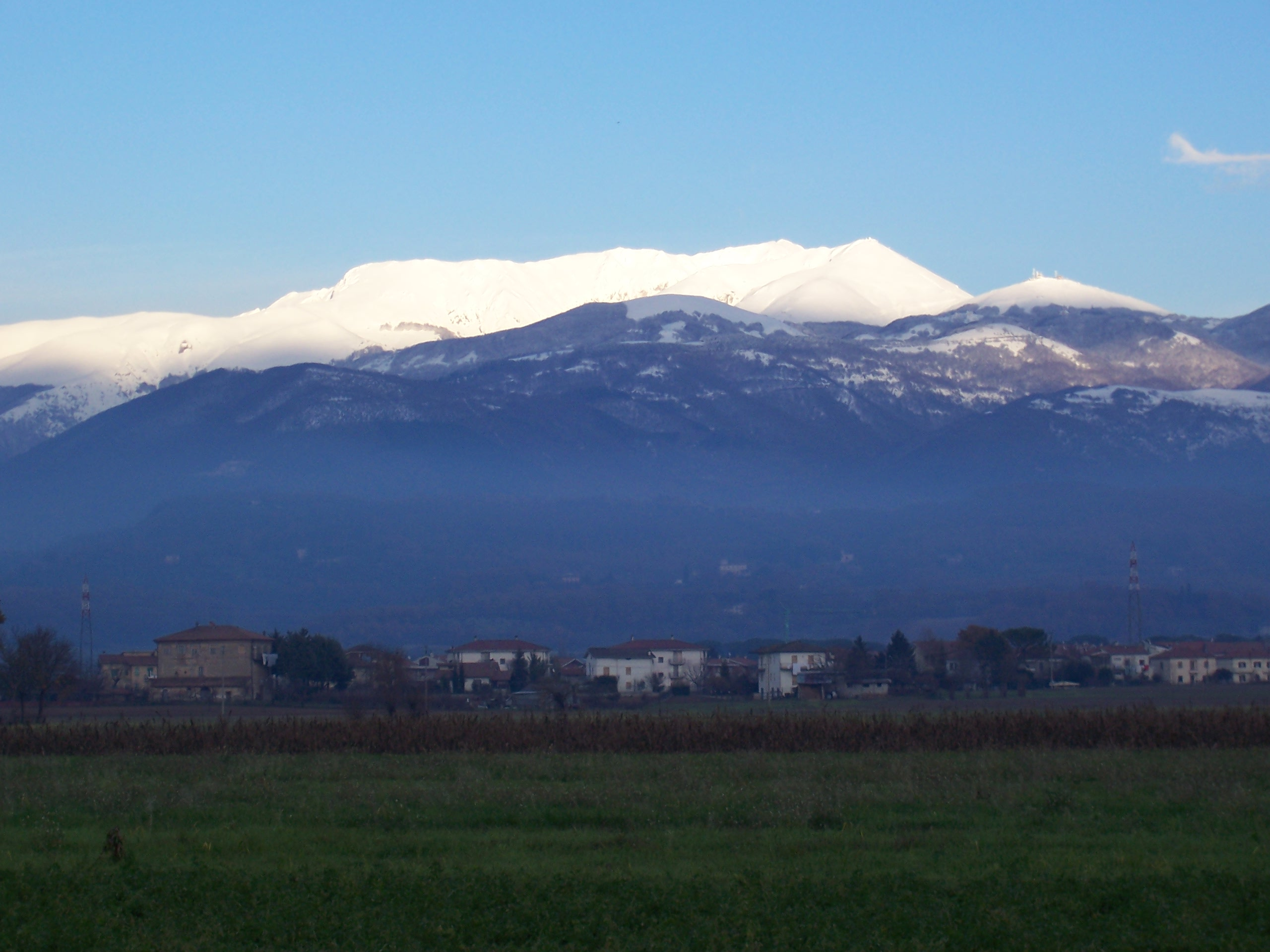 monte Terminillo in provincia di Rieti (Data= 08 dicembre 2005)